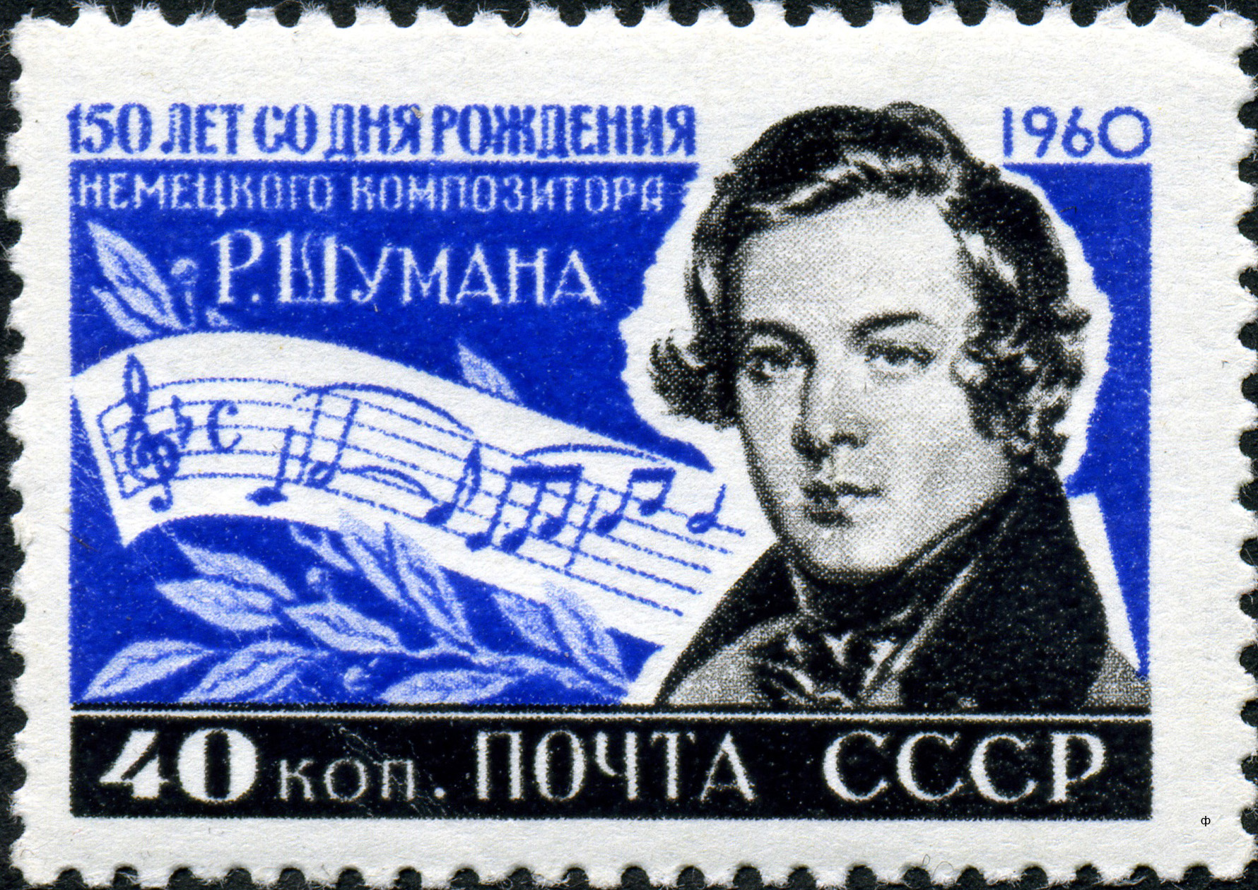 Почтовая марка СССР «150-летие со дня рождения немецкого композитора и музыкального писателя Роберта Шумана (1810—1856)», выпущенная в мае 1960 года. На марке изображён портрет композитора 1839 года по литографии Й. Крихубера, фрагмент фортепьянной пьесы «Грезы». Художник — А. Завьялов. Номер (ЦФА) — 2422. Тираж — 3 млн экз.